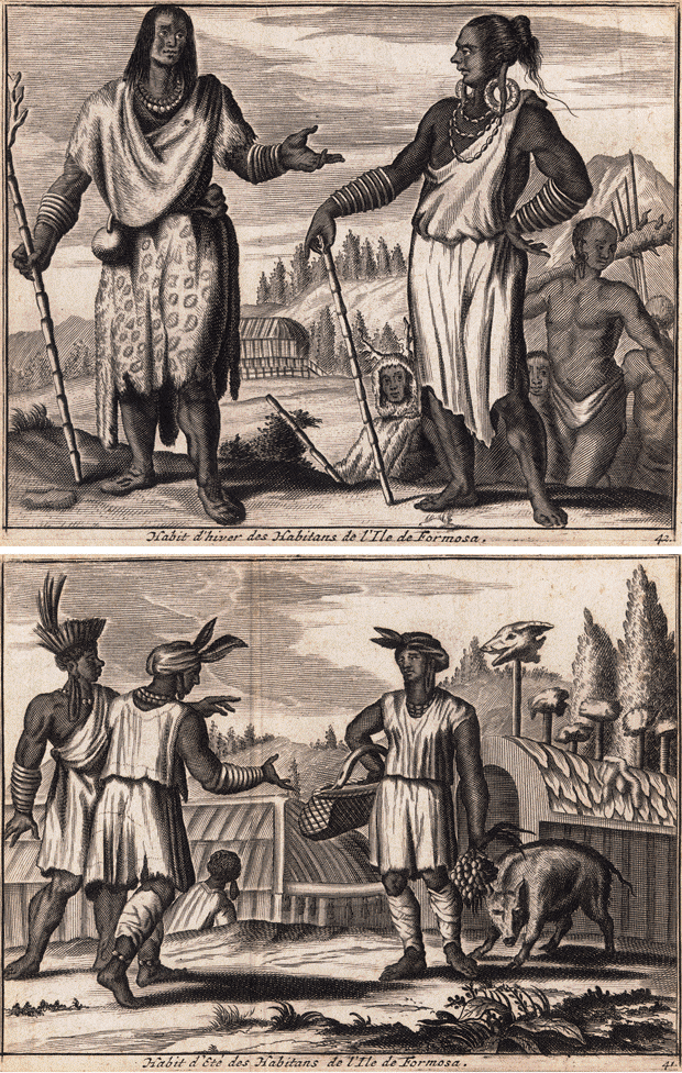 中文（台灣）: Inhabitants of Dutch Formosa (福爾摩沙原住民人物版畫 上圖為原住民發生爭端時,由十二名男子所組成的長老會議協助調停解決;下圖為福爾摩沙原住民在結婚後,妻子及丈夫依然分別在自己家裏食宿,他們也擁有自己的田地,可以耕種稻穀雜糧養活自己